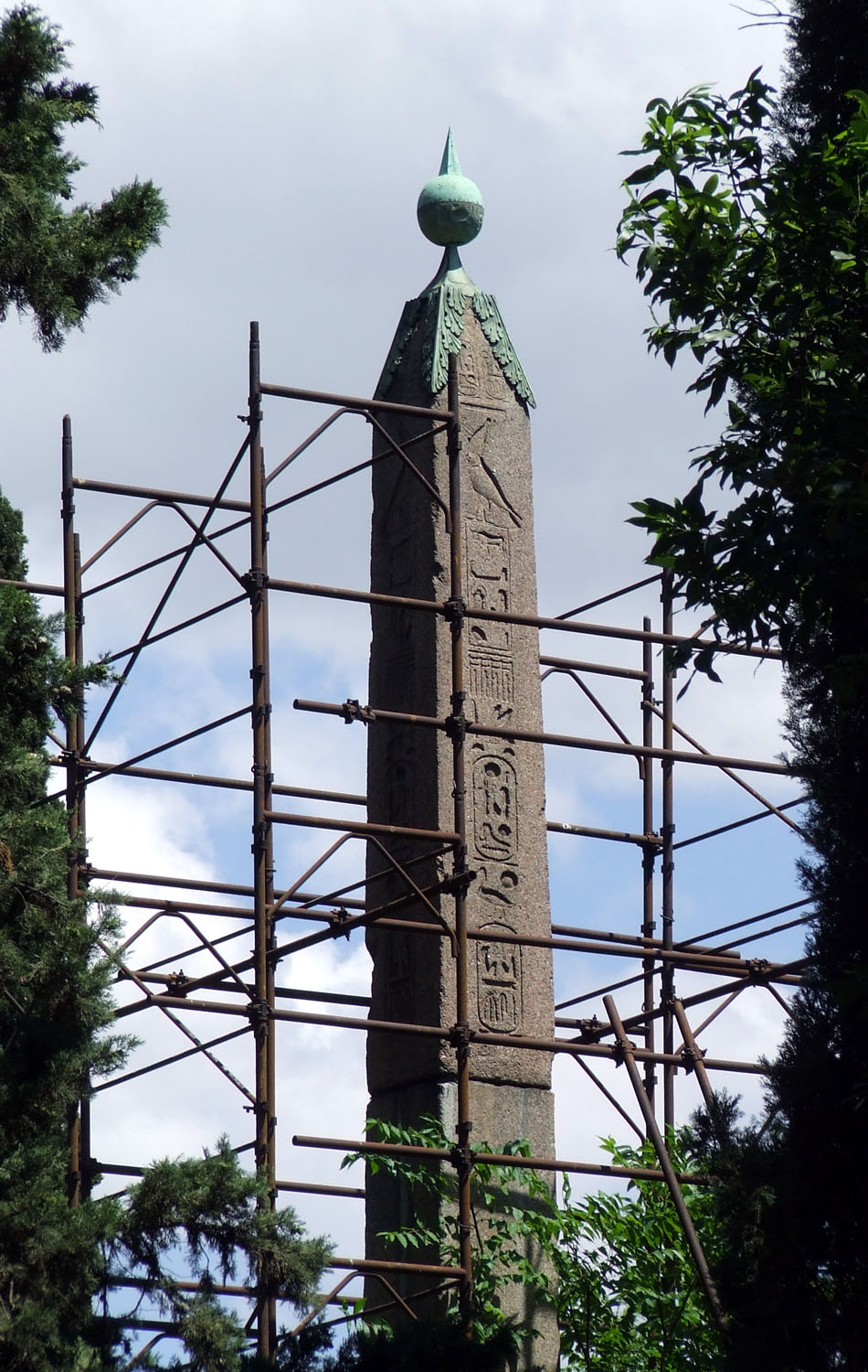 Villa Celimontana, Roma - Obelisco di Ramsete II - attualmente in restauro